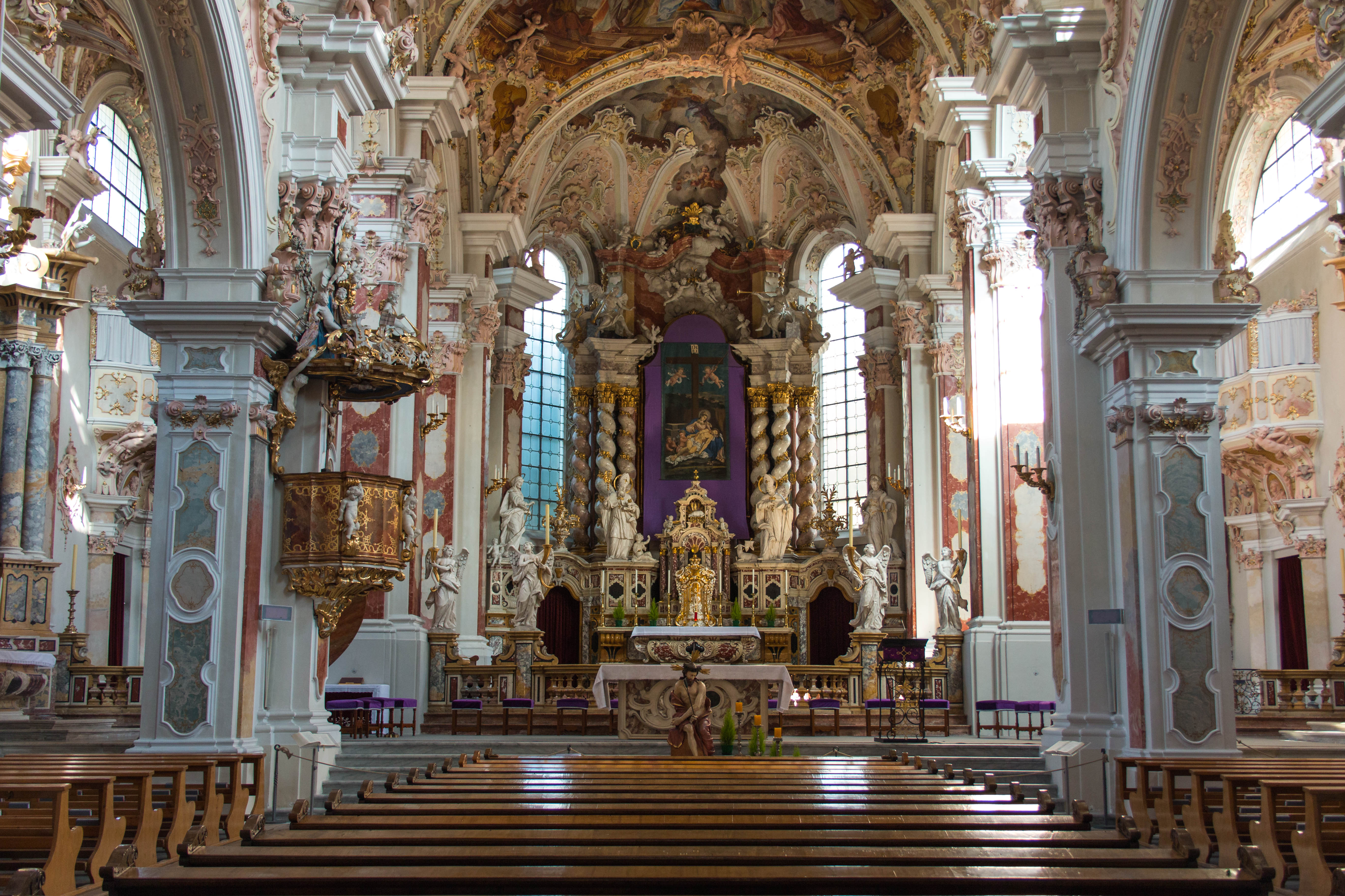 Altar im Kloster Neustift (Vahrn)